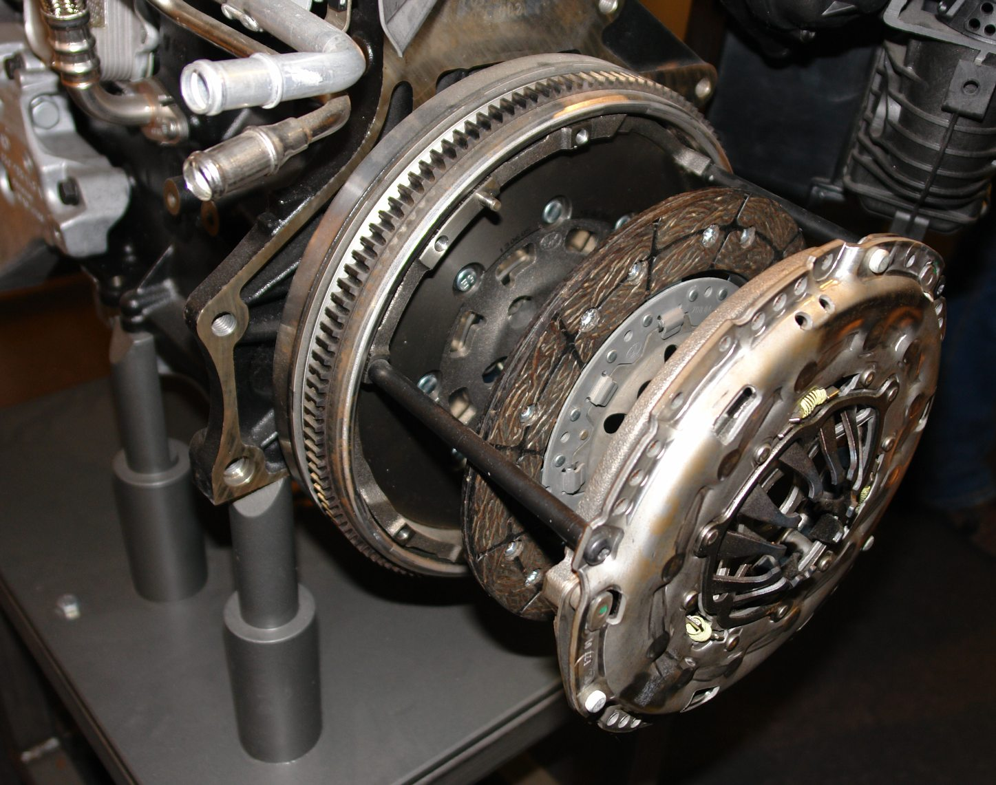 Kupplung an einem VW 1.4l TSI Motor